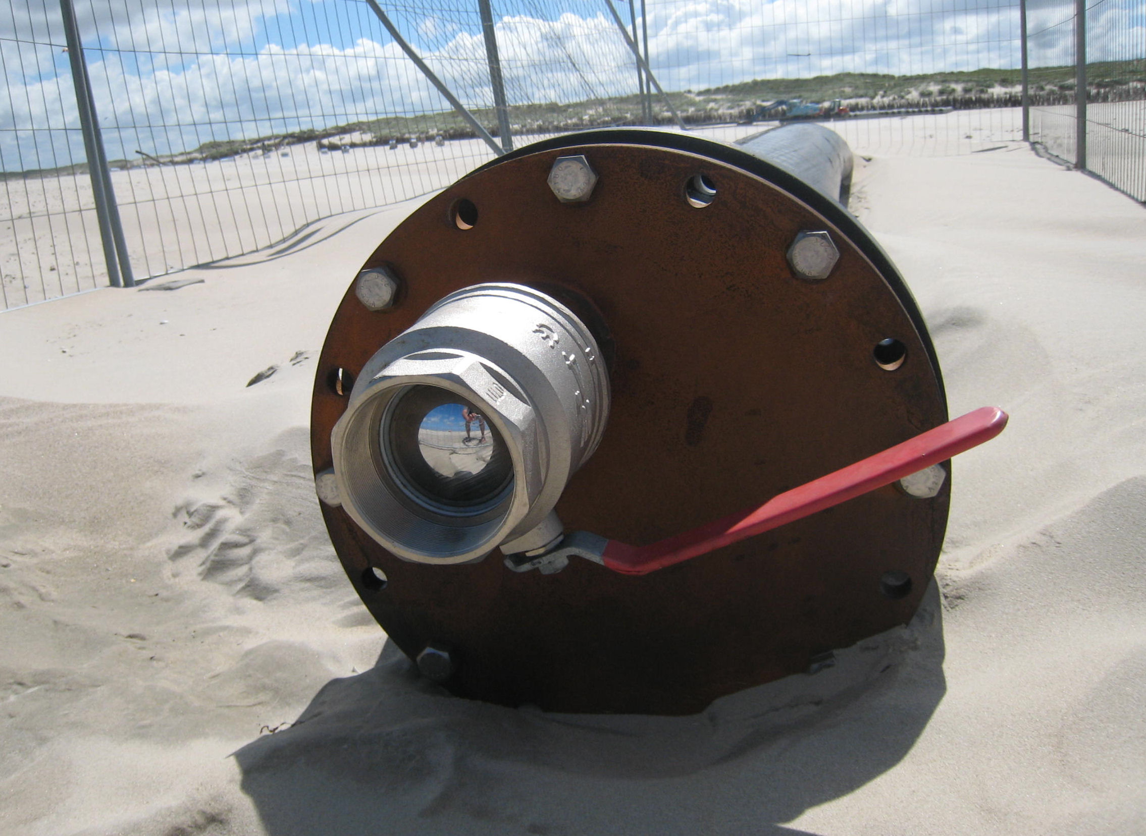 Abschlusskappe eines Leerrohres für Kabel zur Anbindung eines Offshore-Windparks. EON. Strand Norderney. August 2008.